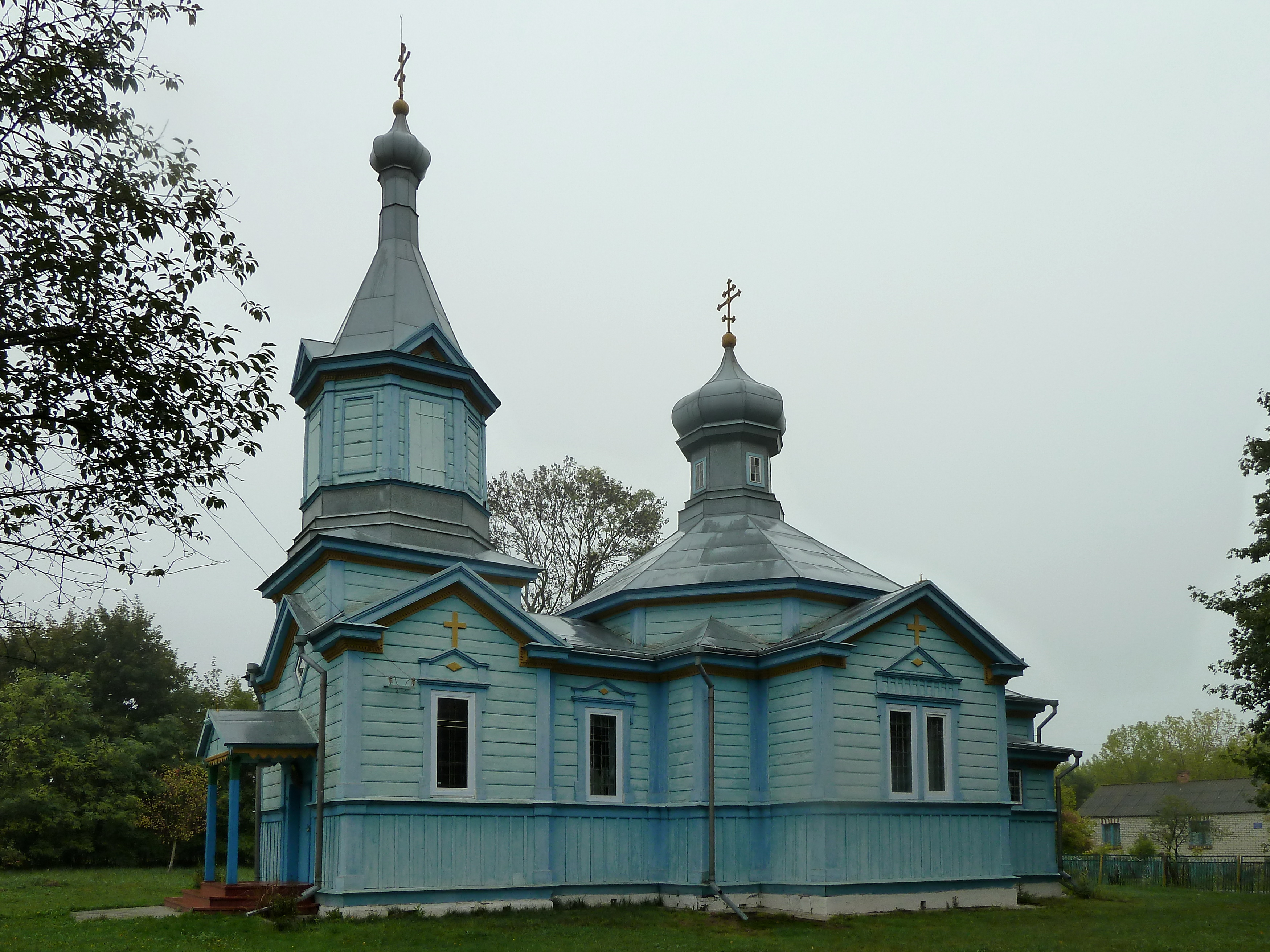 Церква святого Миколая (дер.) (1900 рік) - вигляд з південного заходу - с.Тумин Локачинський район Волинська область Україна